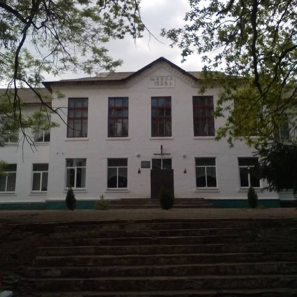 Школа у селі Синьки Кіровоградської області